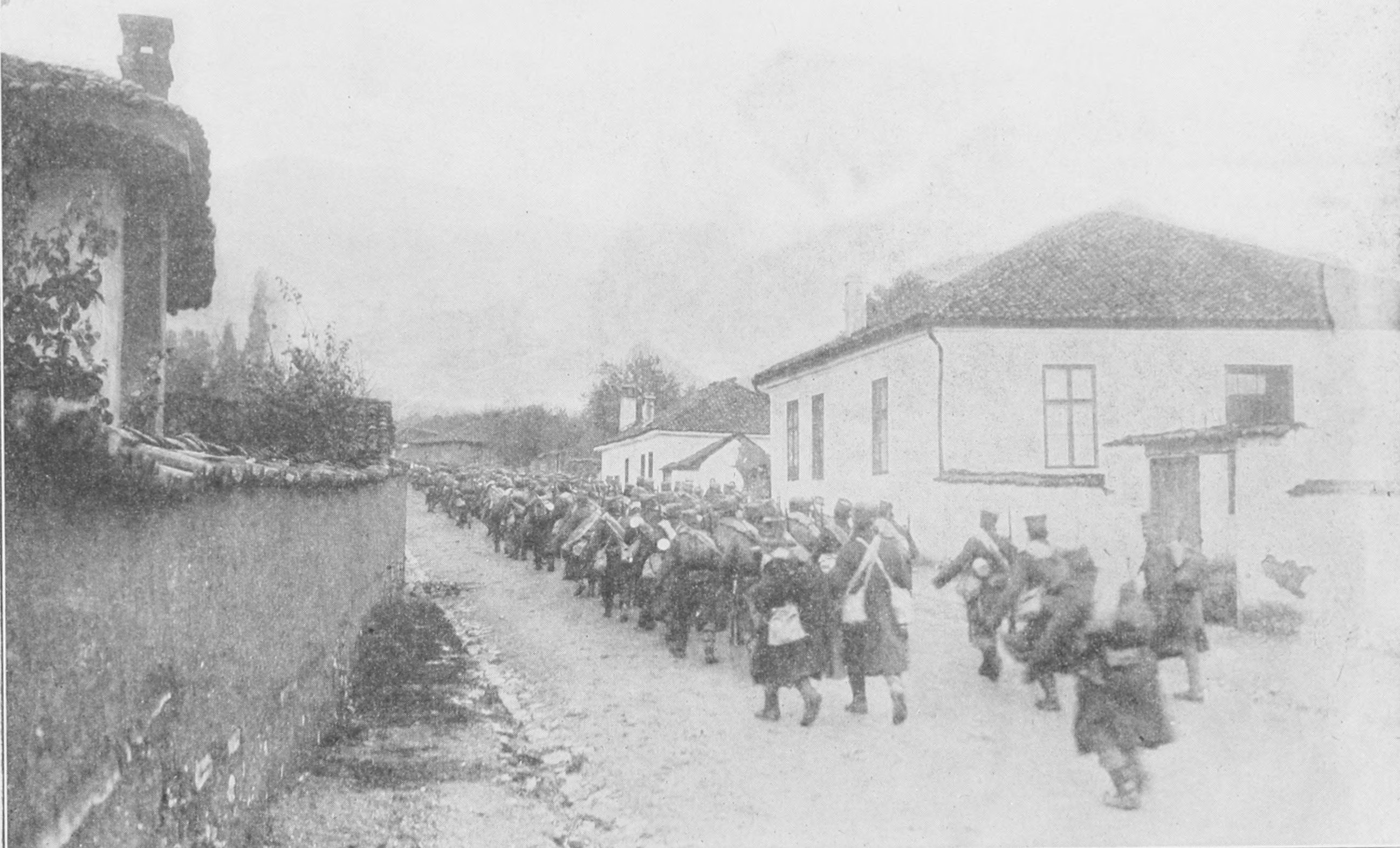 Tropas serbias evacuando Nis en la Primera Guerra Mundial.